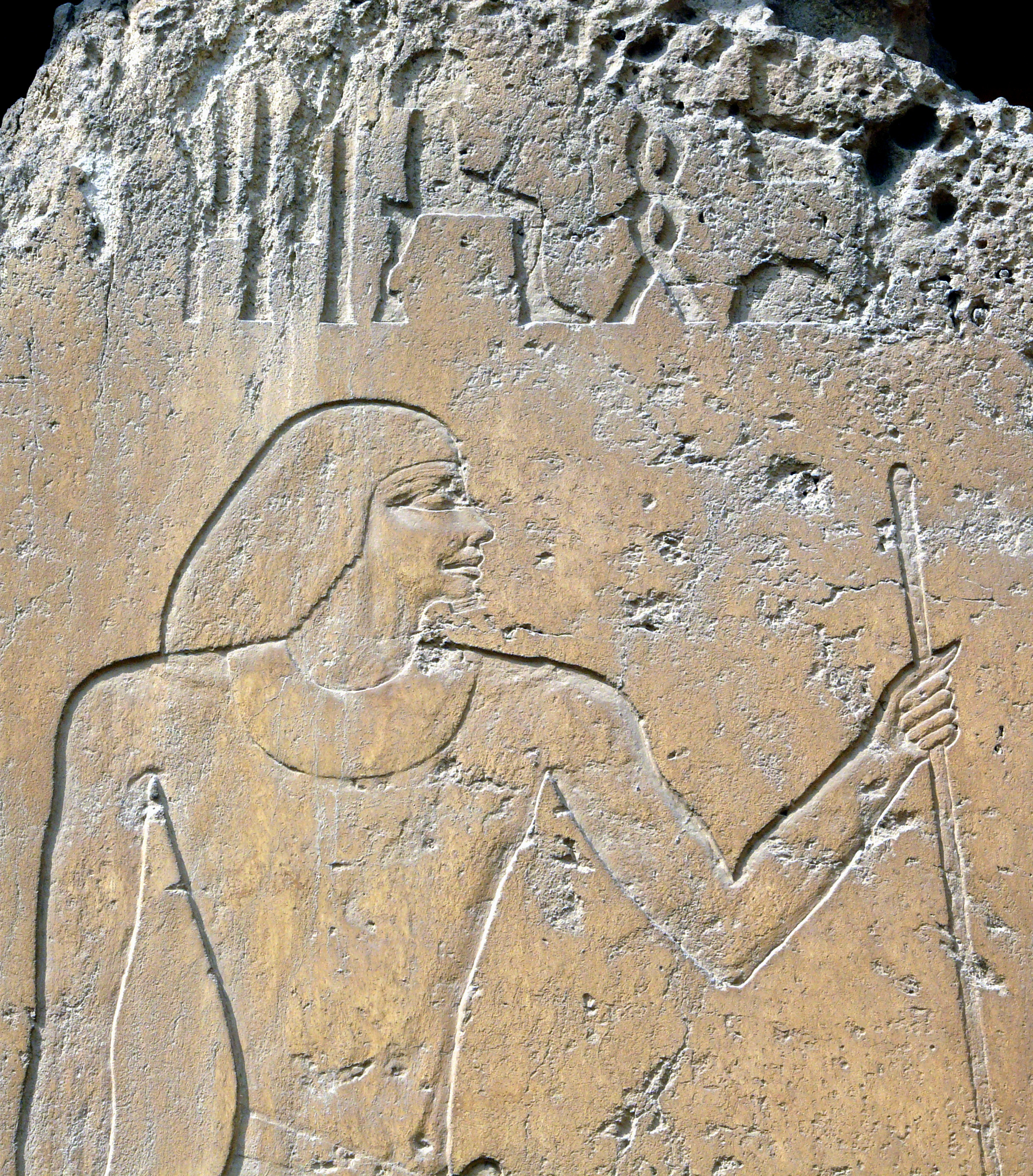 Représentation de Ptahchepsès (Ve dynastie) sur une colonne de la cour centrale de son mastaba - Abousir